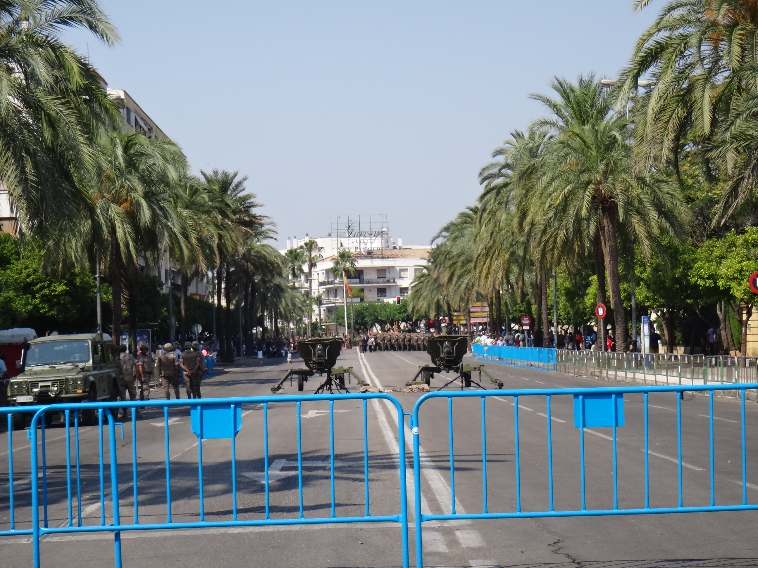 Parada militar en homenaje al Regimiento de Artillería nº 74 en su 75 aniversario. Jerez de la Frontera (Andalucía, España)